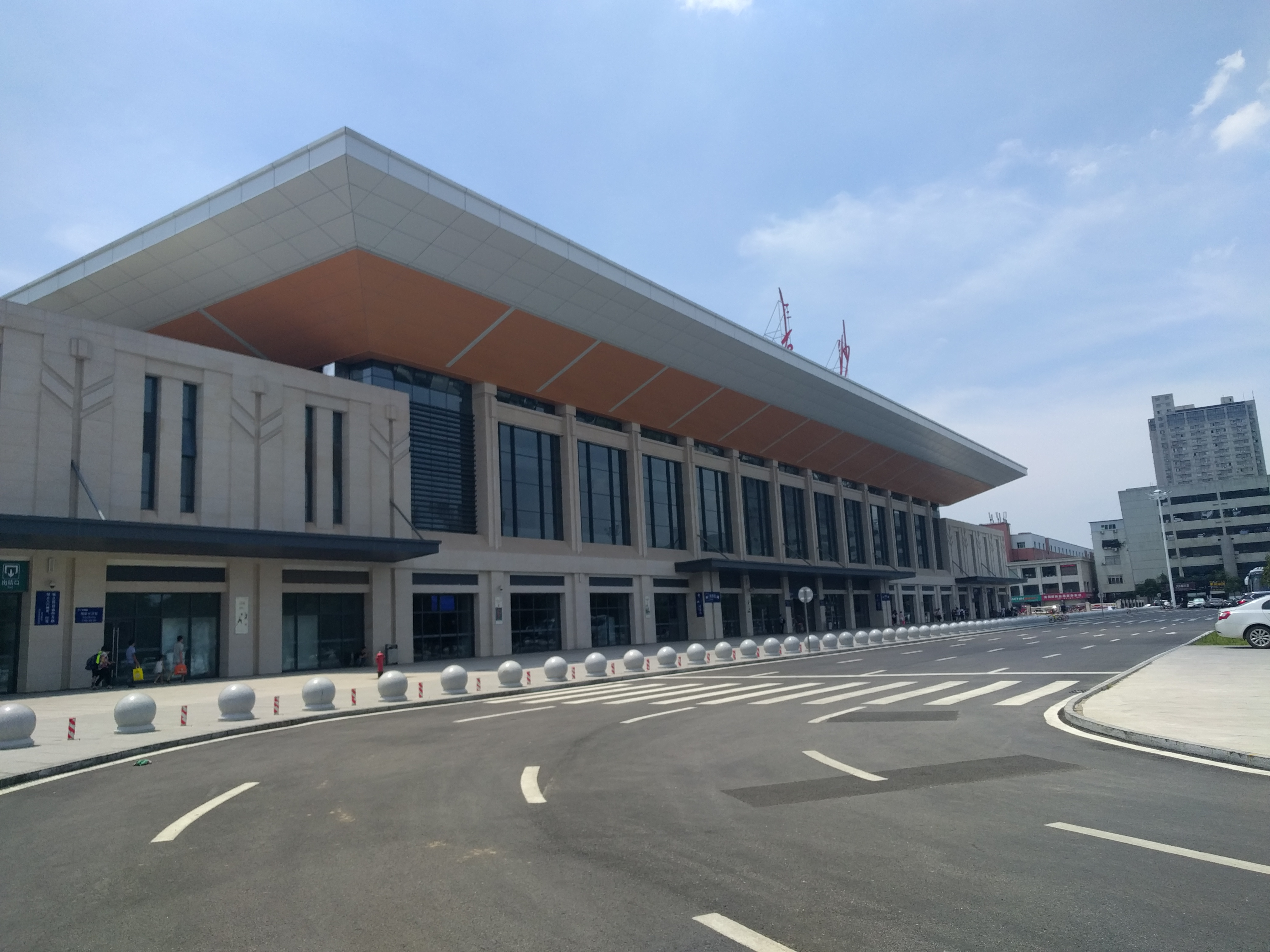 长沙站城际端站房